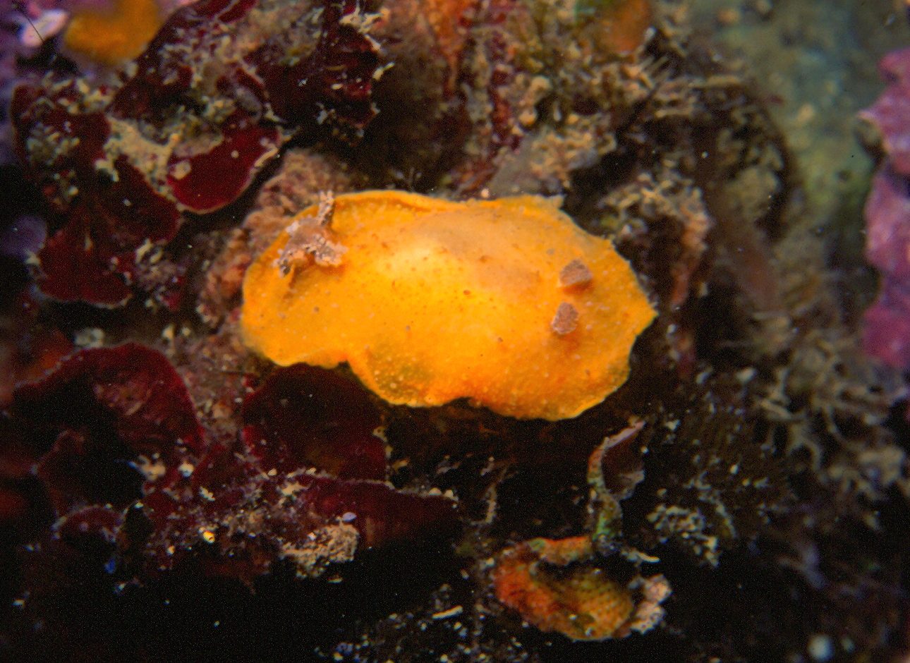 Tordisa filix Pruvot-Fol, 1951 - Banyuls-sur-Mer : 08/84